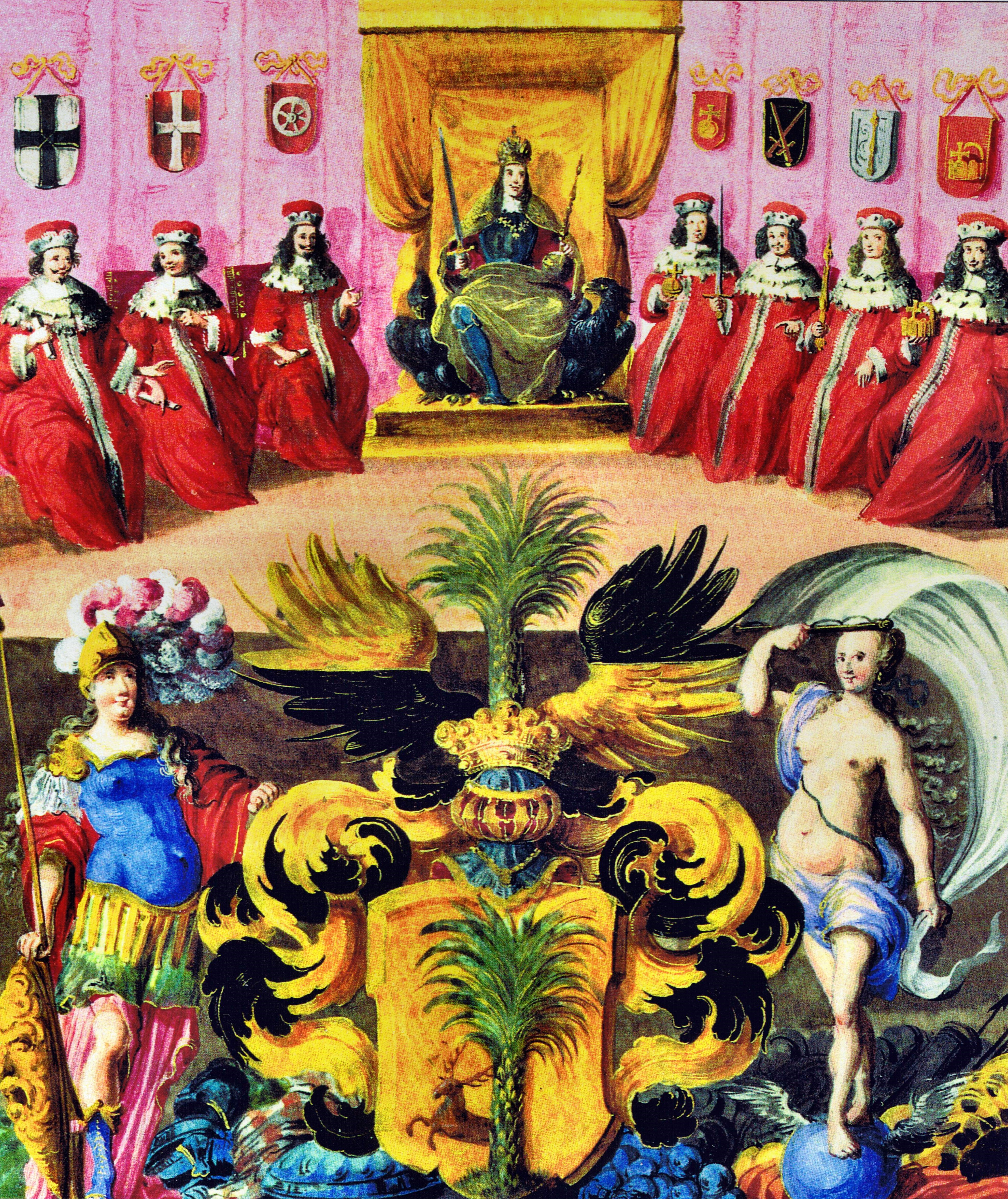 Malerei aus dem Adelsbrief des Johann von Graffen, 1662